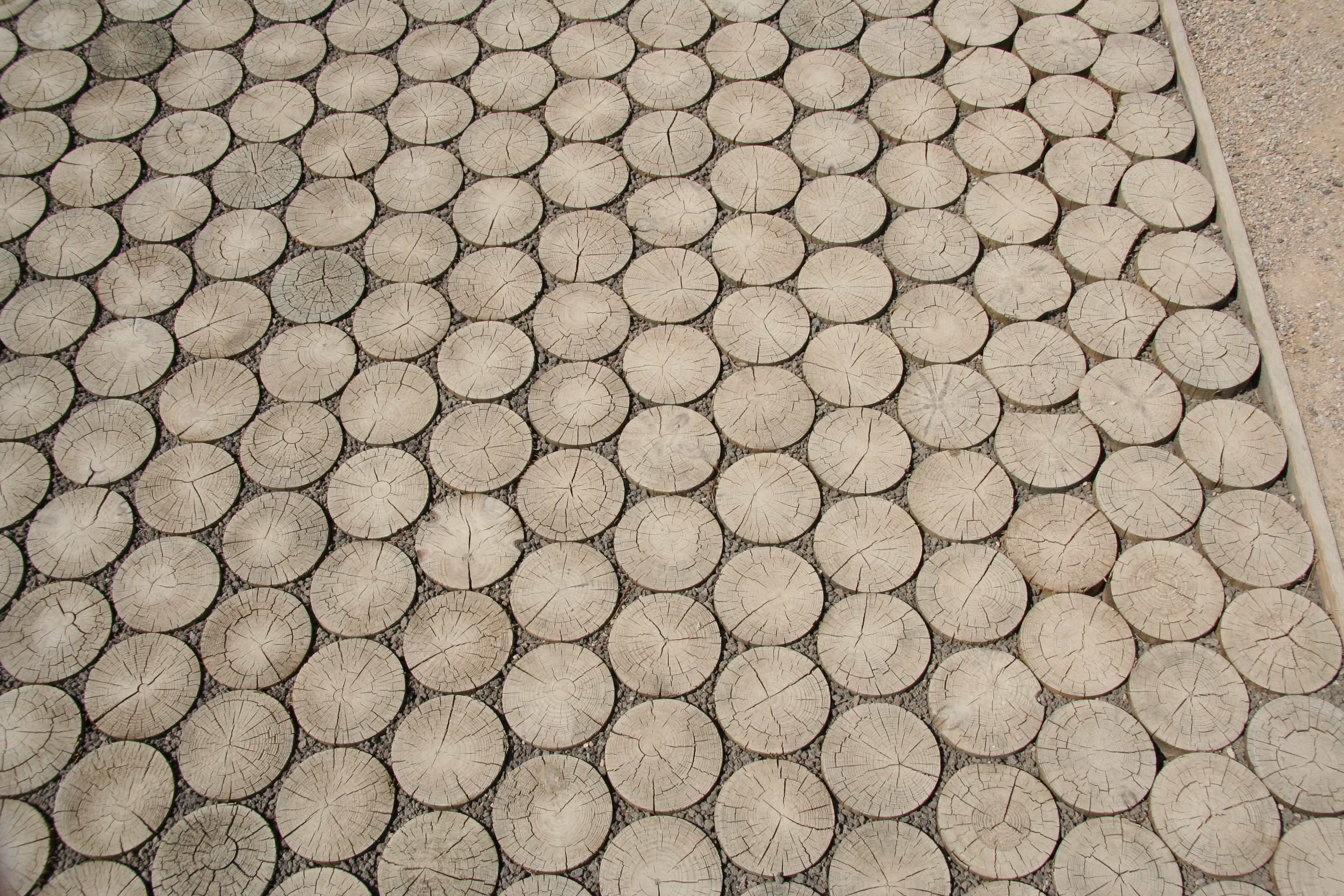 Holzpflaster auf der BUGA Koblenz 2011